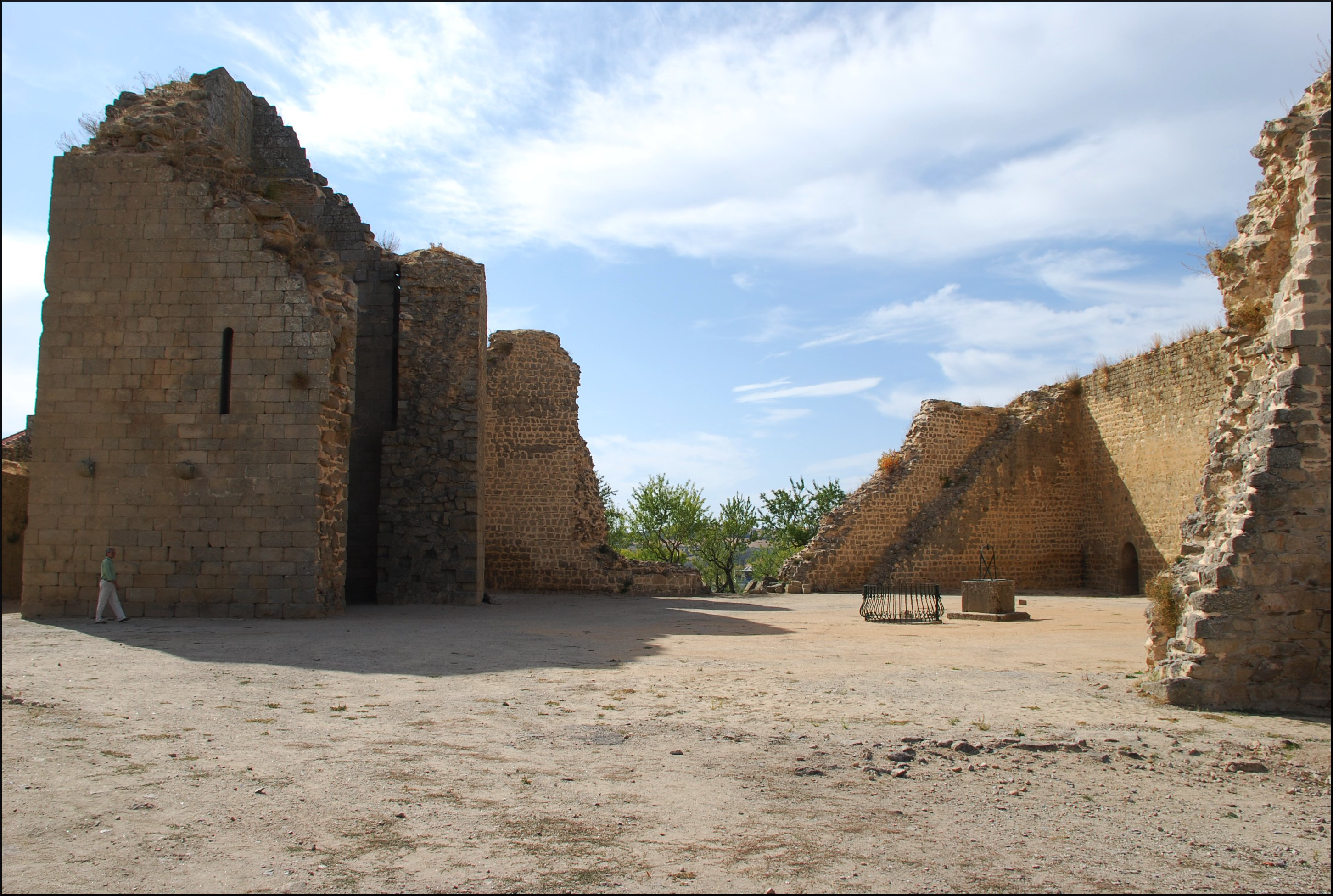 Castillo de Miranda do Douro